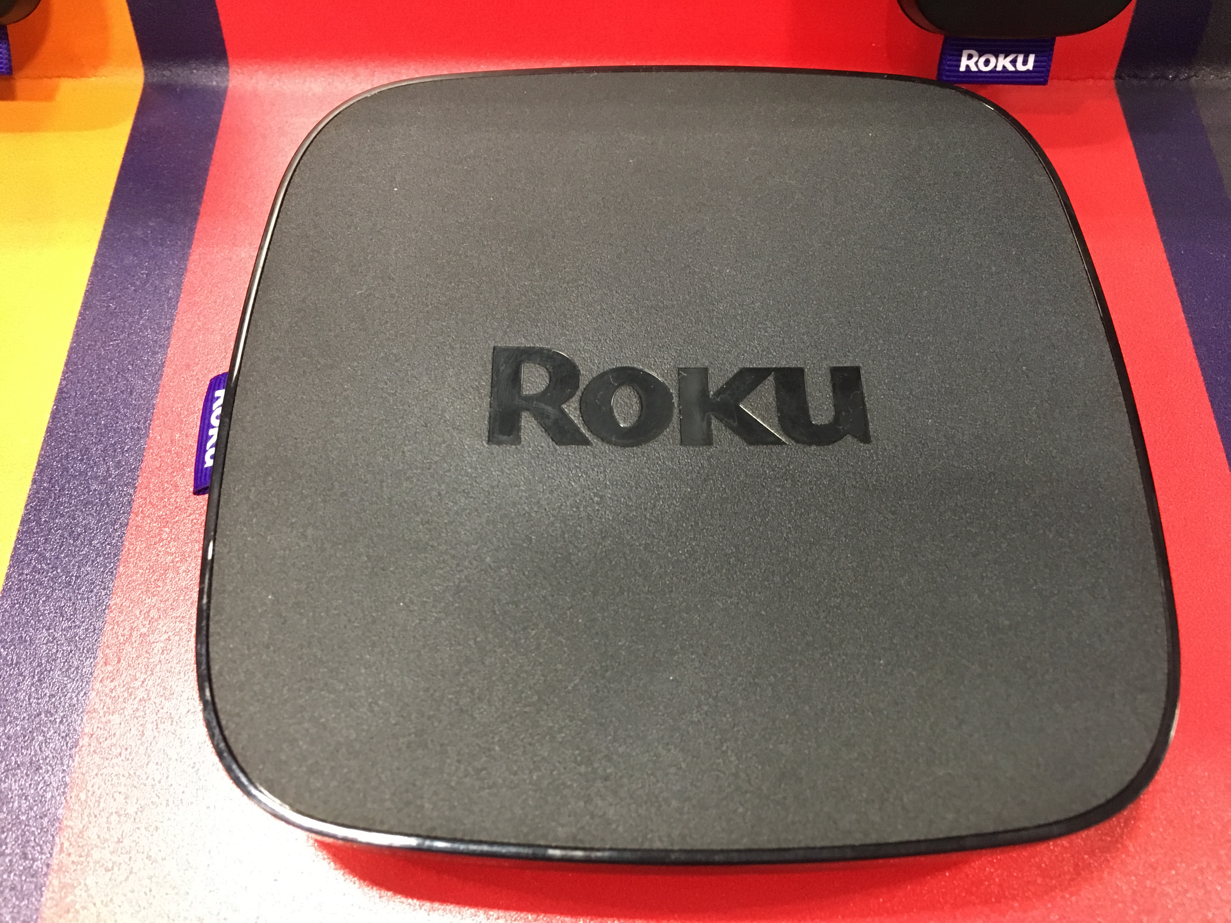 Roku